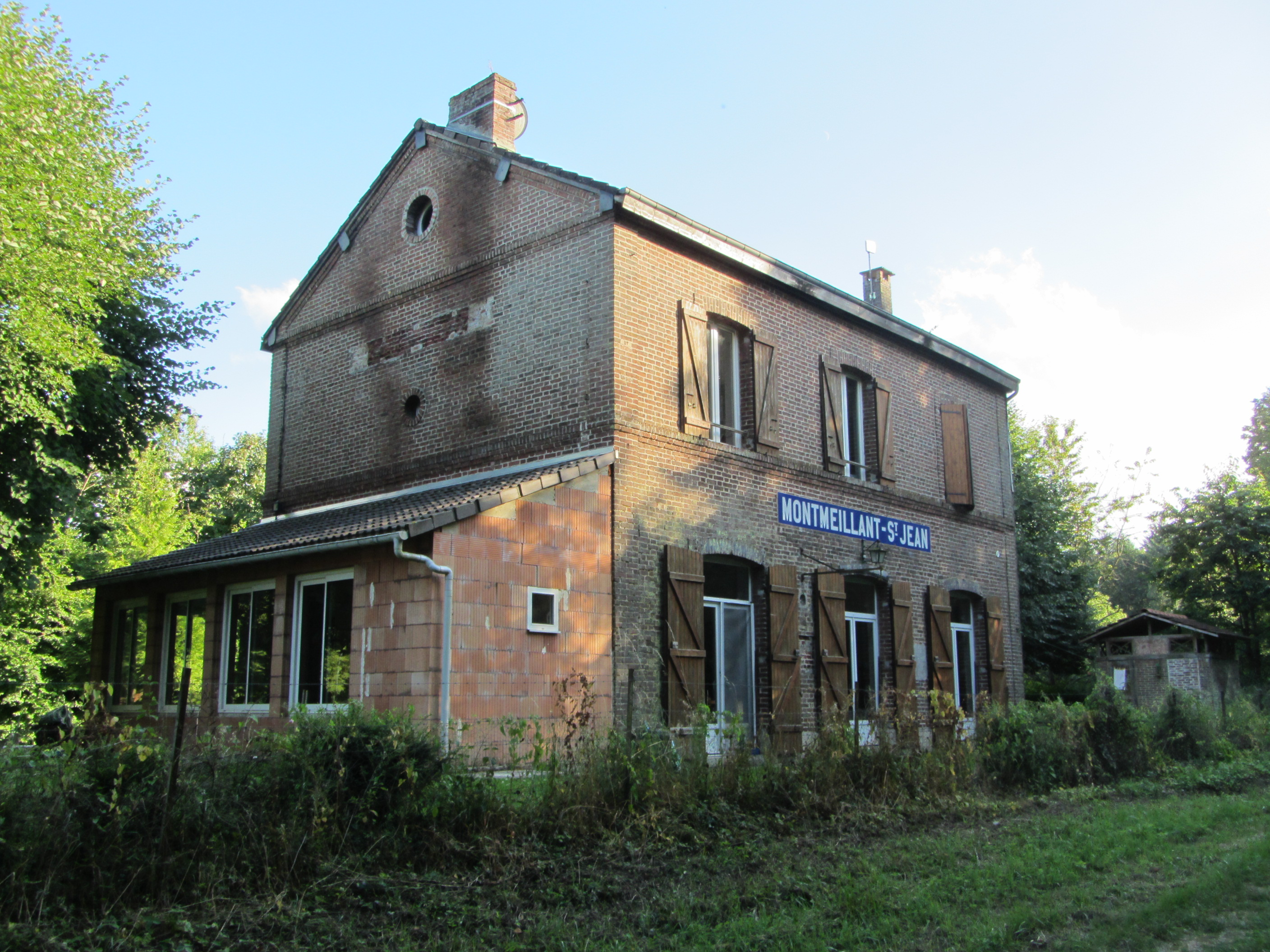 Voormalig stationsgebouw van Saint-Jean-aux-Bois en Montmeillant (Ardennes)